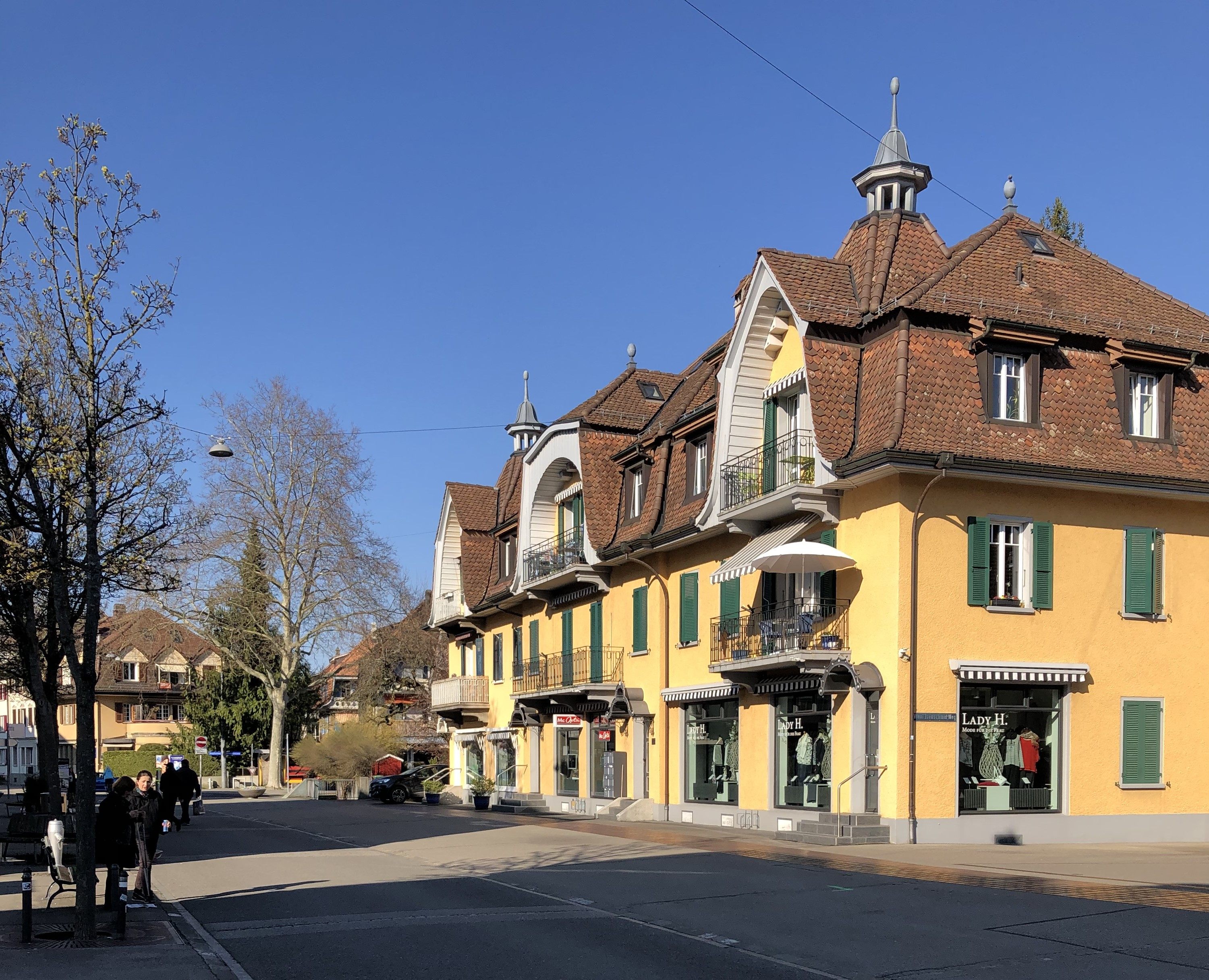 Bümpliz Dorf Bebauung Fussgängerzone